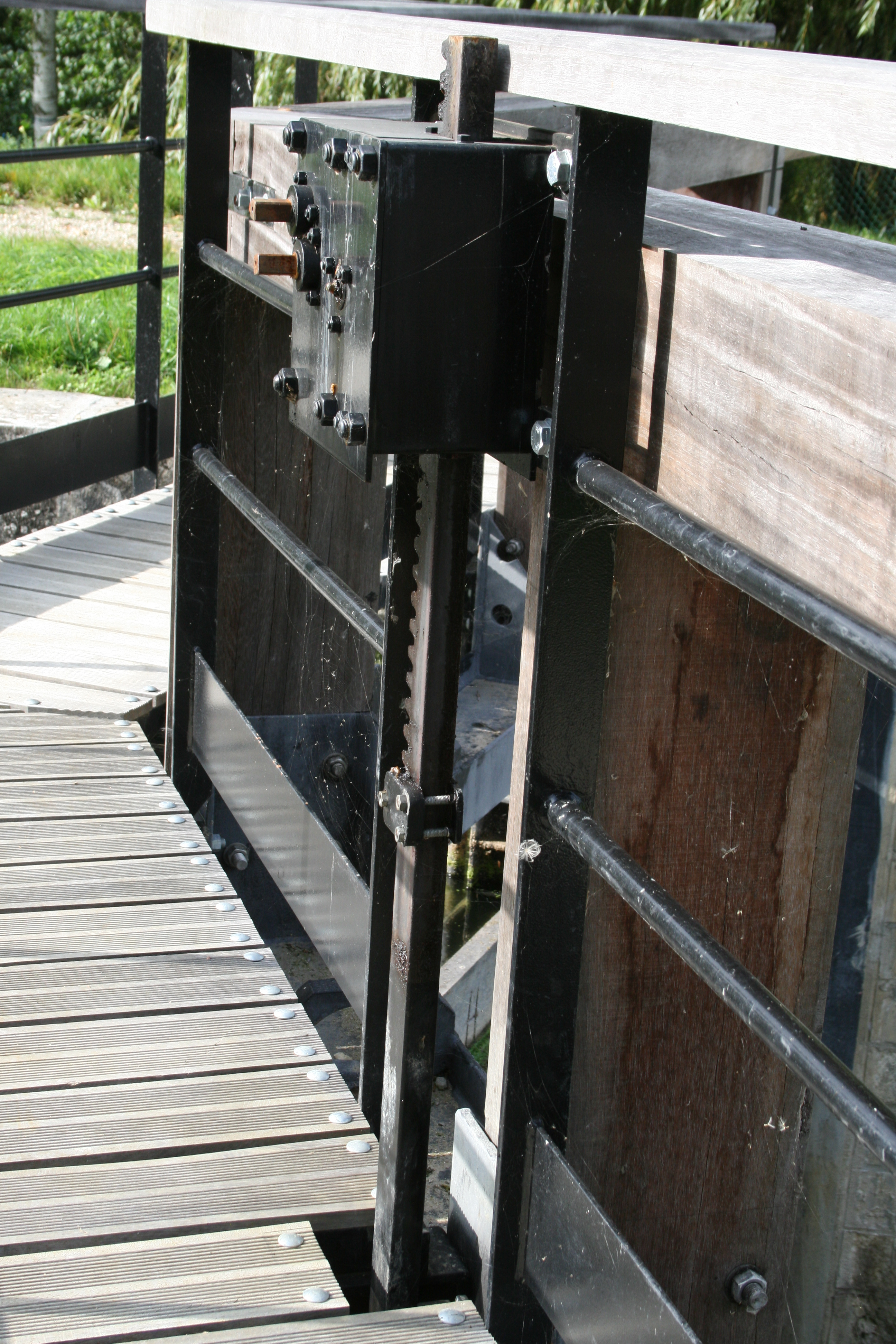 Canal d’Orléans. Ecluse du Hateau